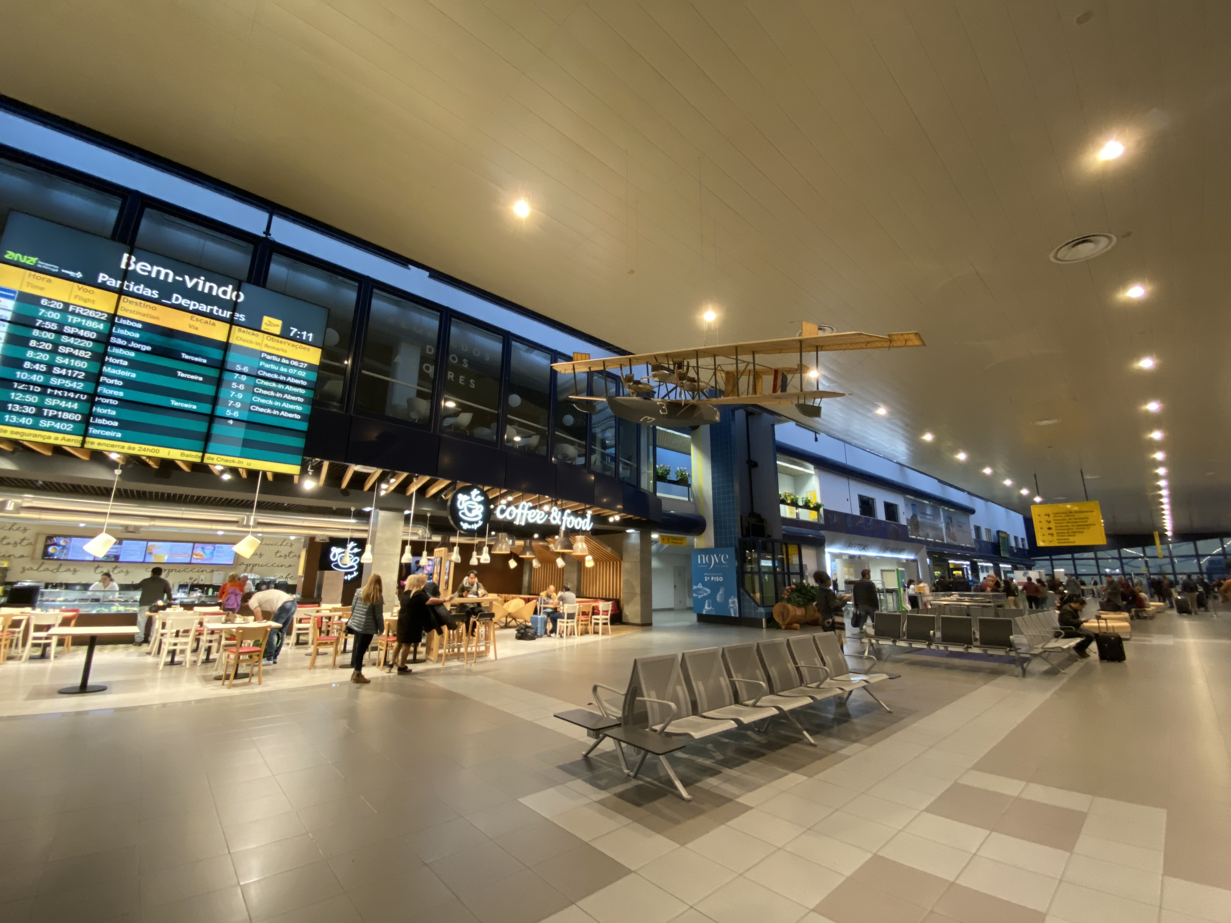 João Paulo II Airport, Ponta Delgada, São Miguel, Azores (Açores) Archipelago, Portugal